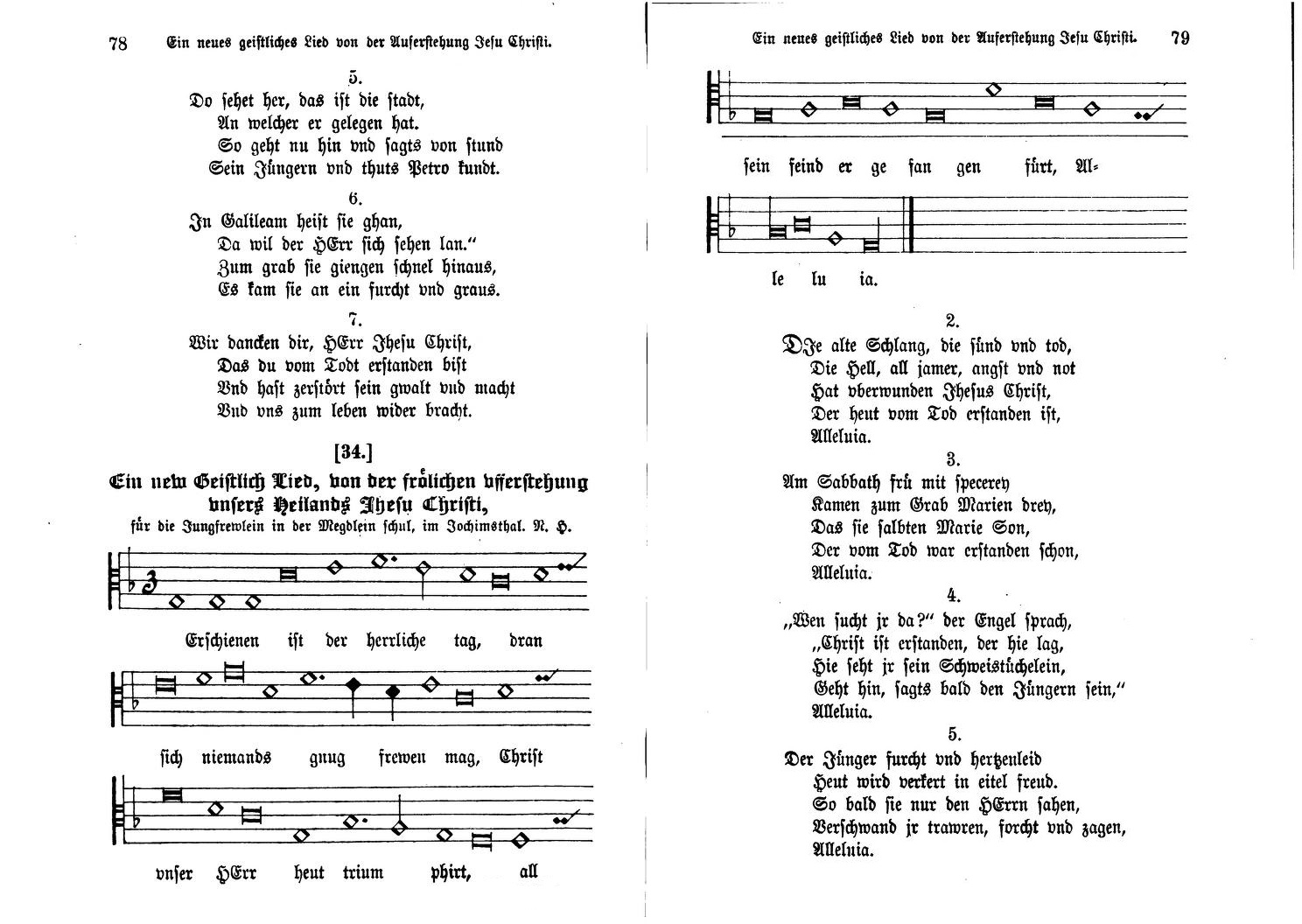 Nicolaus Herman: Erschienen ist der herrlich Tag, Urtext 1561